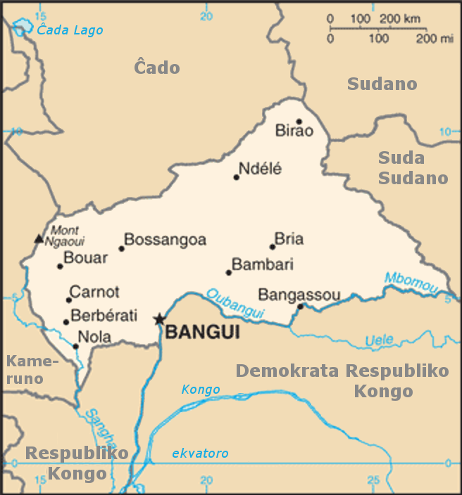 esperantlingvigo de la mapo Central African Republic-CIA WFB Map.png el la Monda Faktlibro